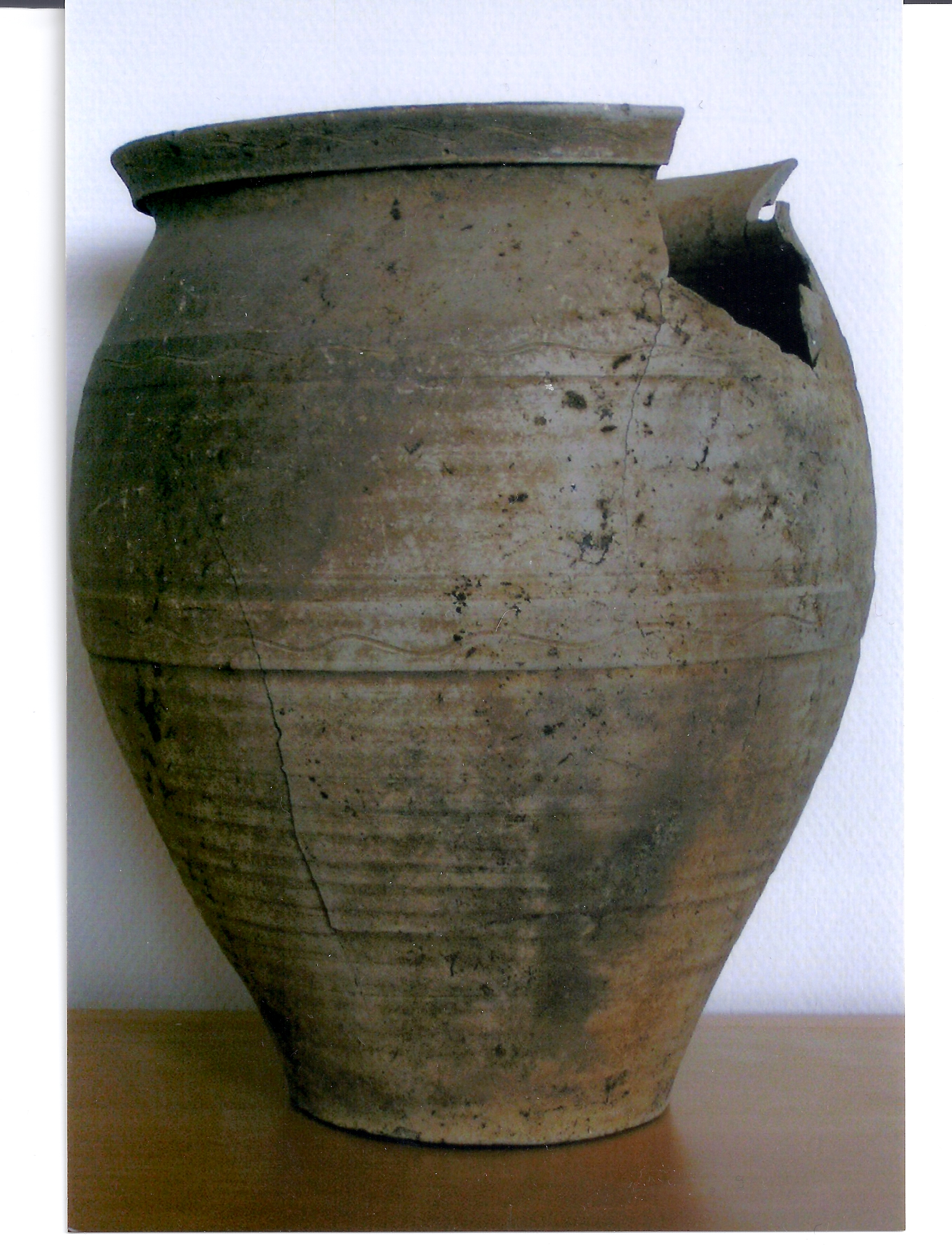 Dünnwandiger Topf mit Kragenrand aus Niederbayern / Rottal